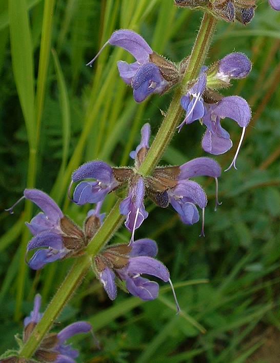 Sauge des prés, Gy, mai 2004